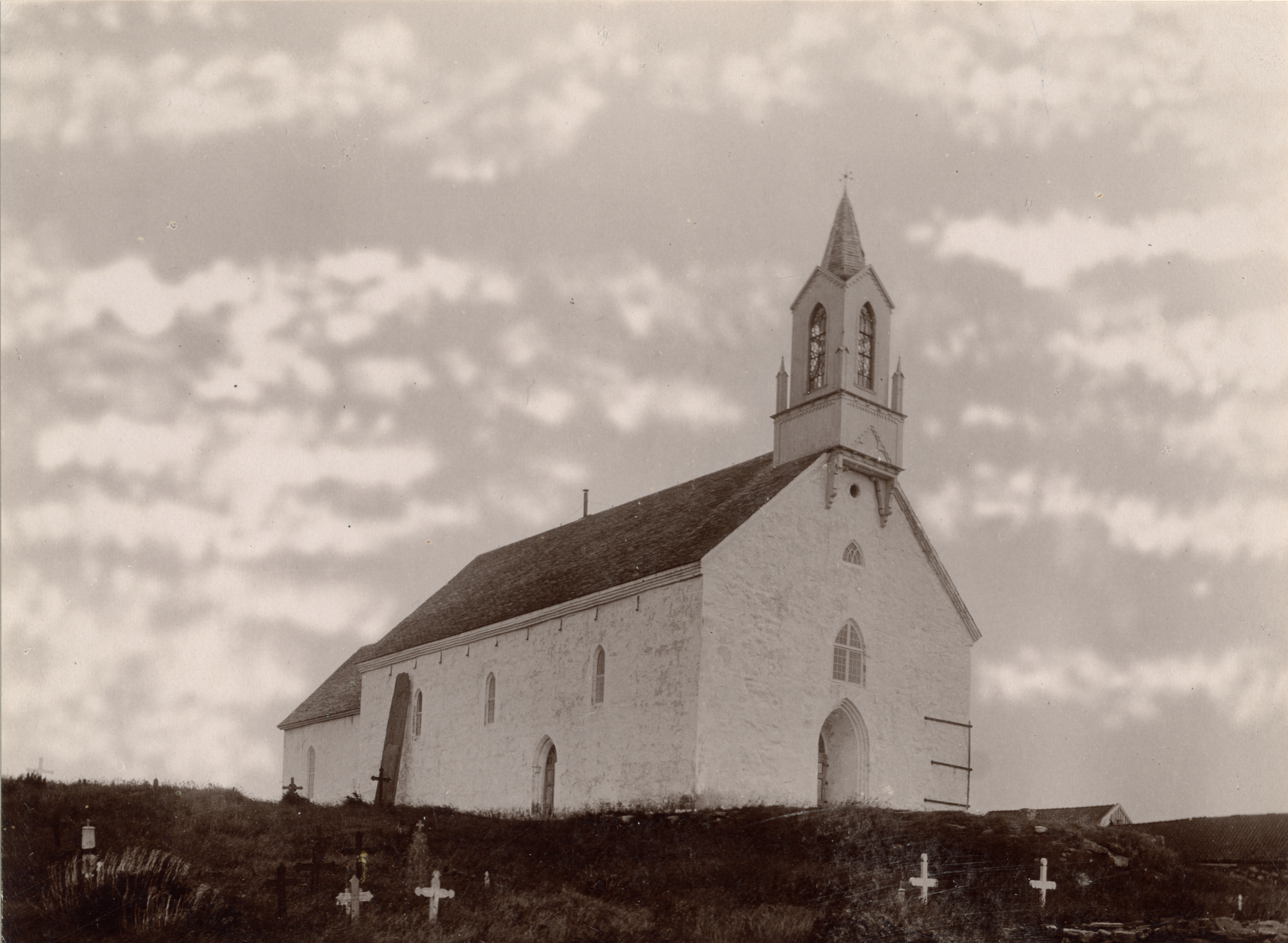 Avaldsnes kirke i Avaldsnes, Rogaland